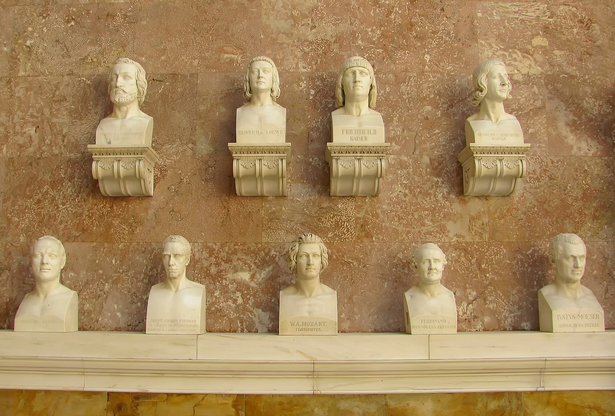 Innenansicht Walhalla (Marmorbüsten Nr. 6 bis 14)